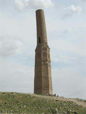 مناره (میل) کرات در روستای کرات تایباد، ایران